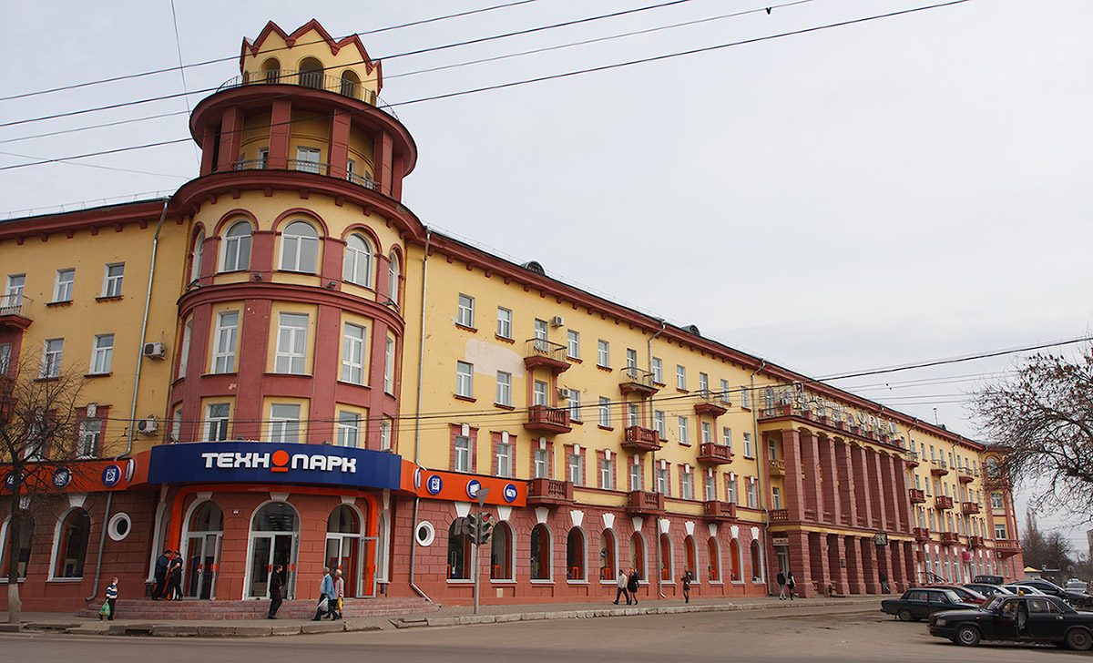 гостиница Орёл; 15.04.2012